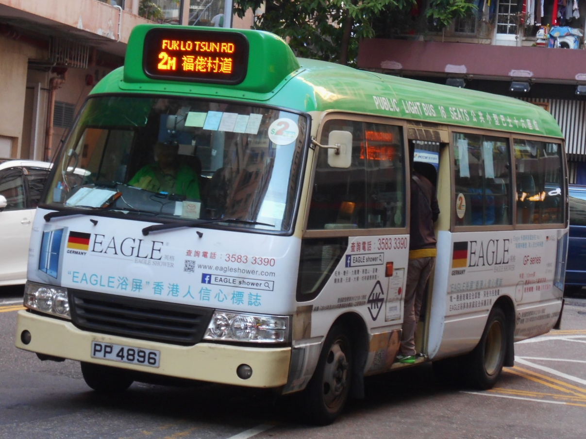 九龍專線小巴2M線